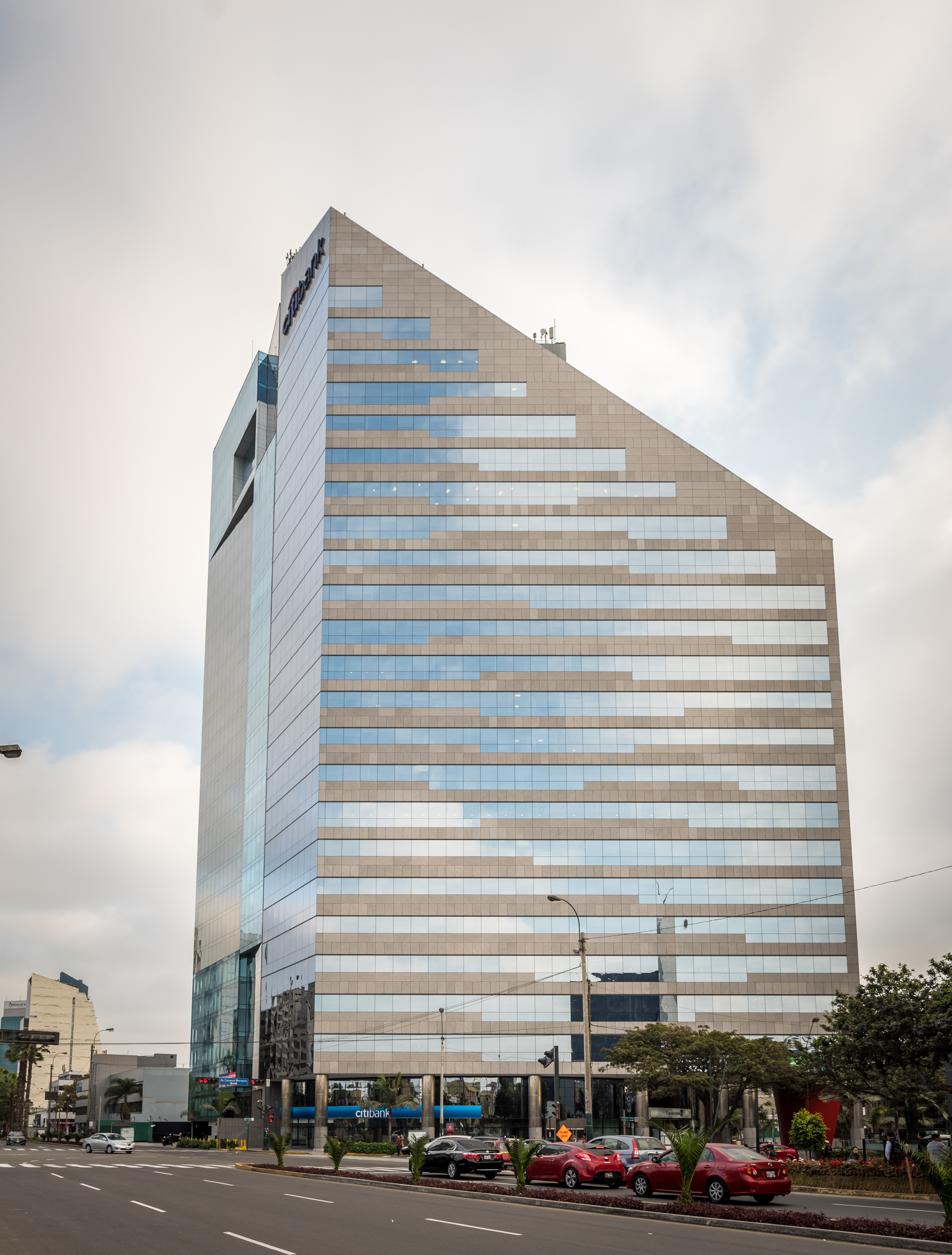 Fotografía de Edificio Chocavento en San Isidro.